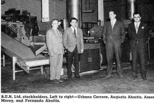 Socios de Bun SA frente a la nueva freidora JD Ferry, Buenos Aires 1959